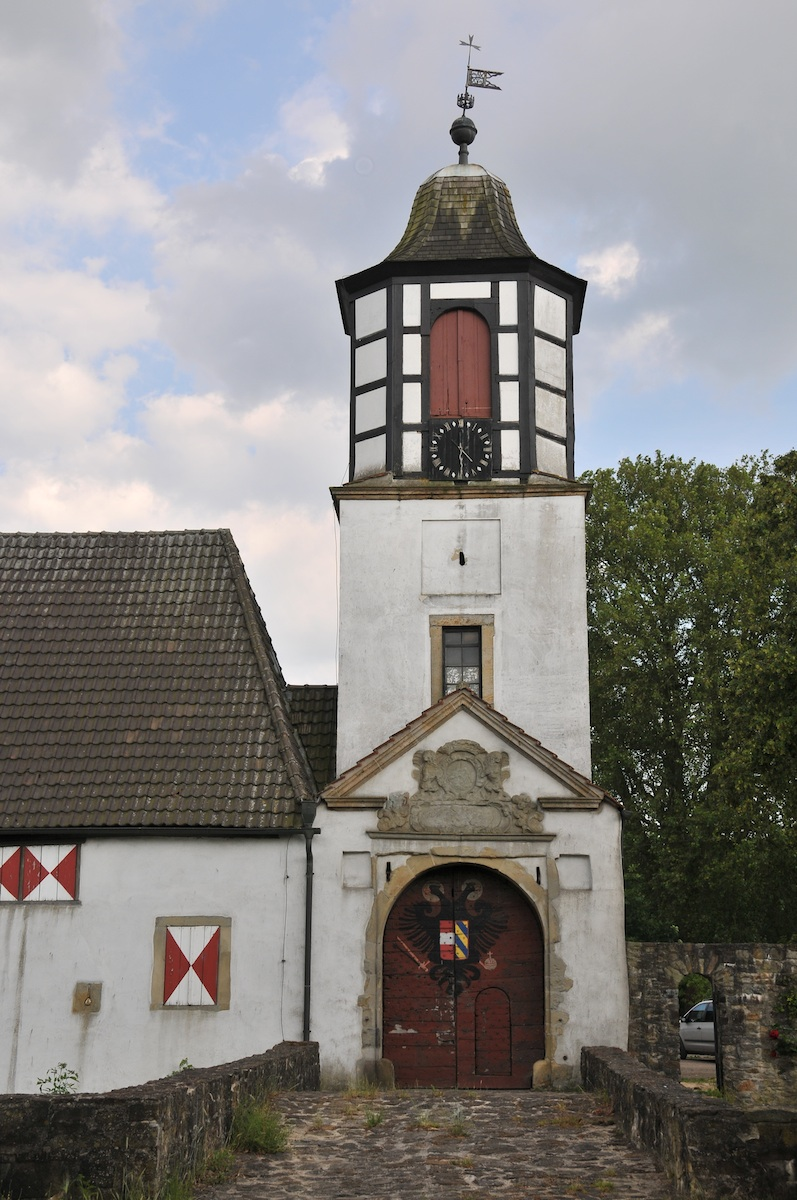 Schloss Barenau